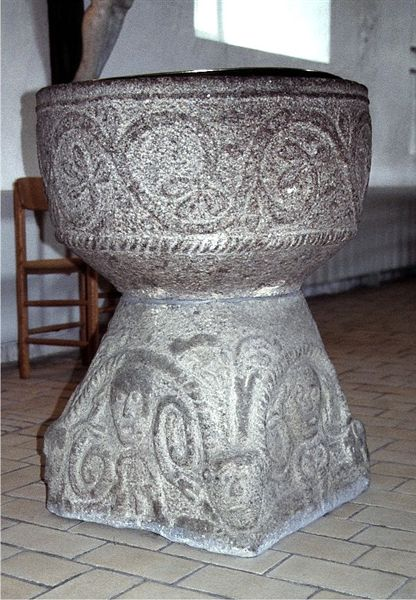 Gelsted Kirke i Danmark. Gelsted kirke, døbefont